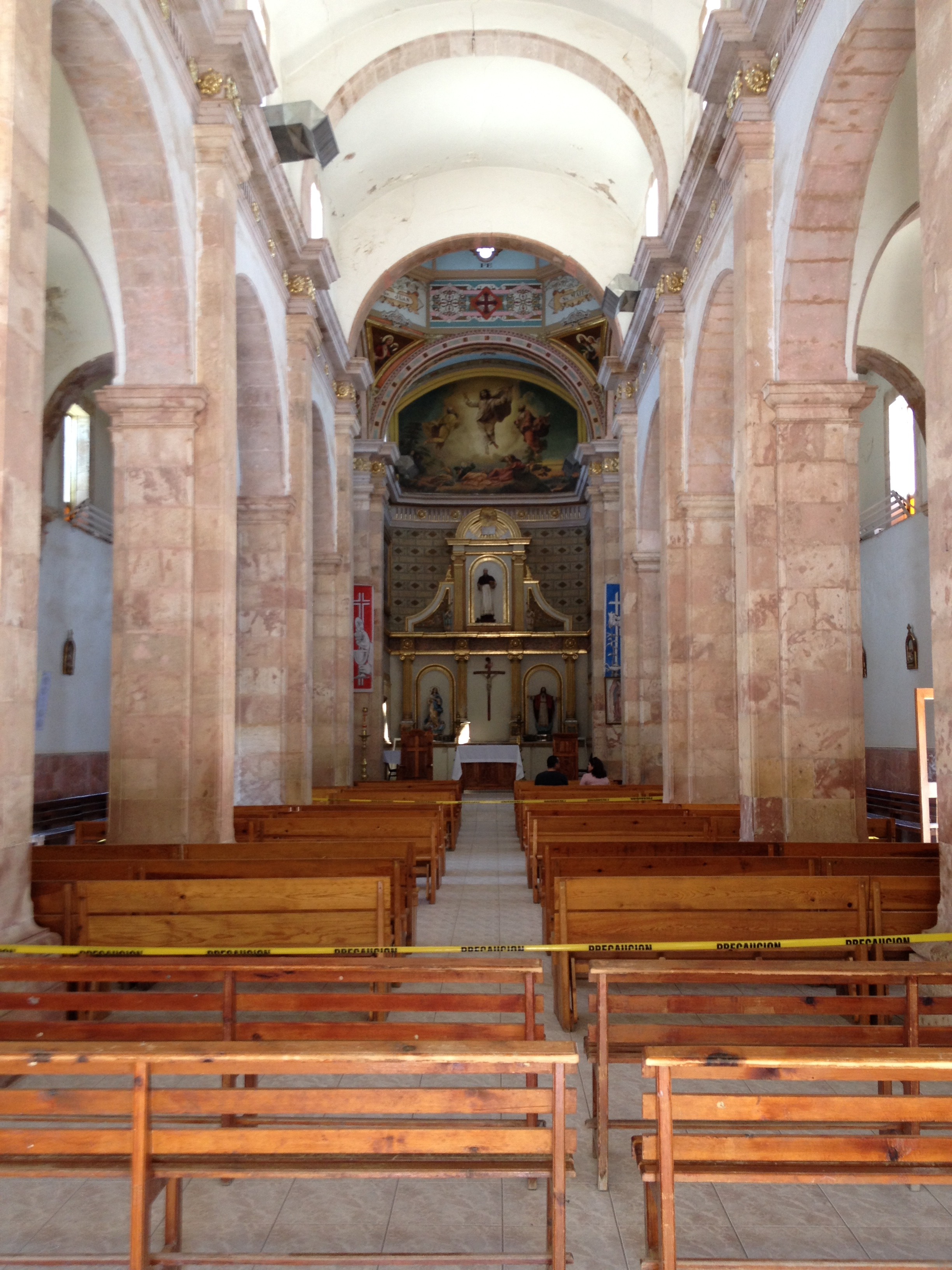 Nave central del Templo de San Jerónimo en Aldama, Chihuahua